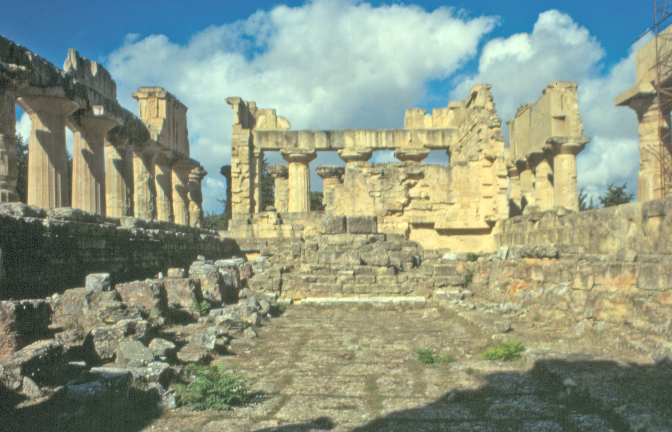 Libia, Cirene (sito archeologico), Tempio di Zeus, interno